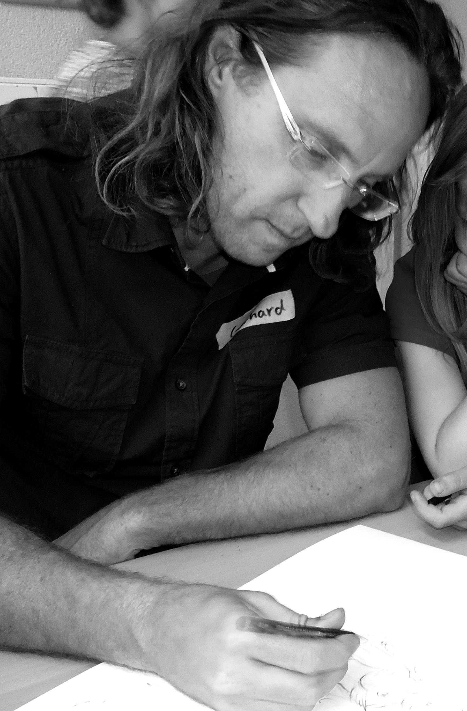 Zeichenkurs